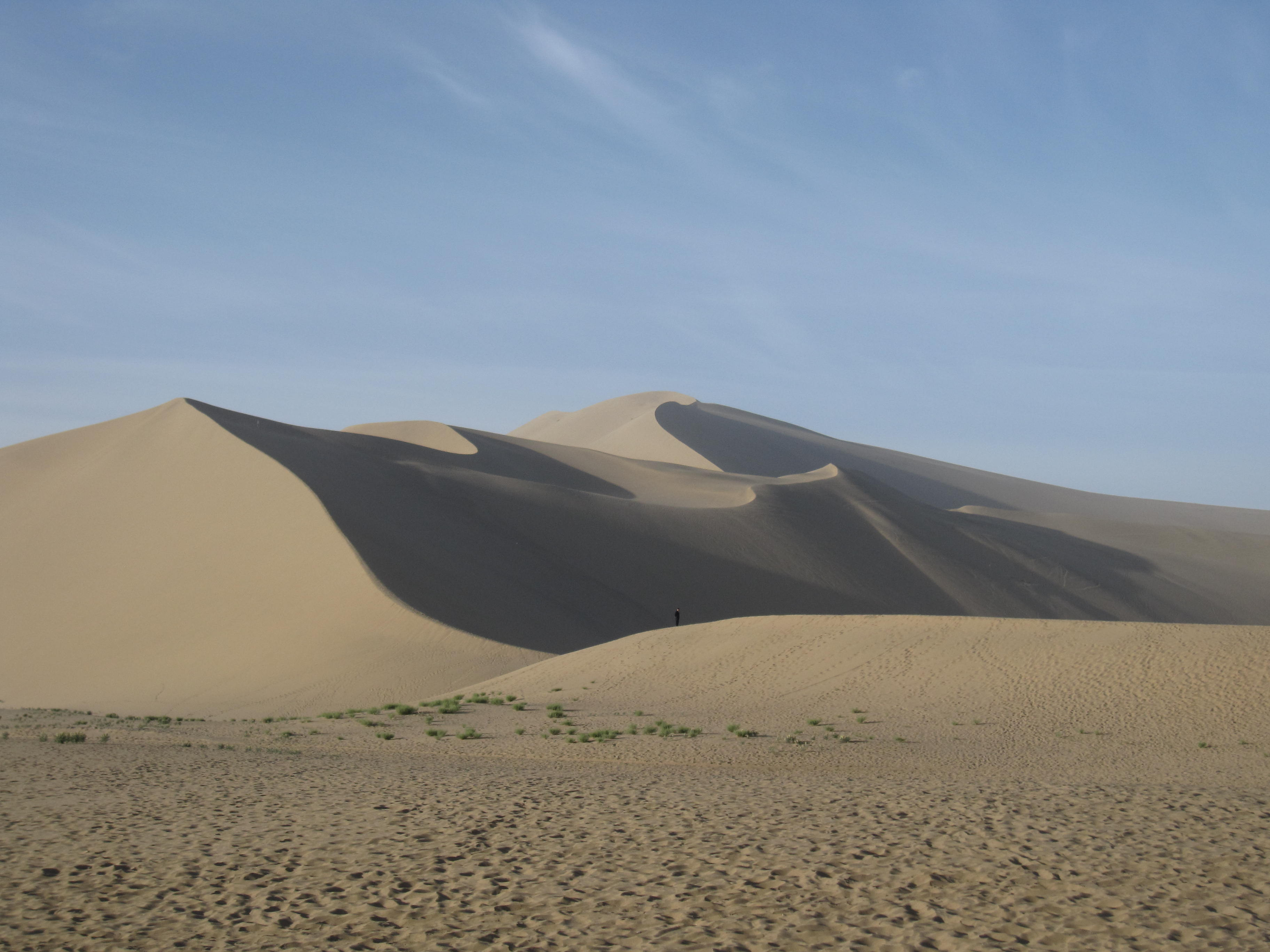 דיונה אאולית בסין